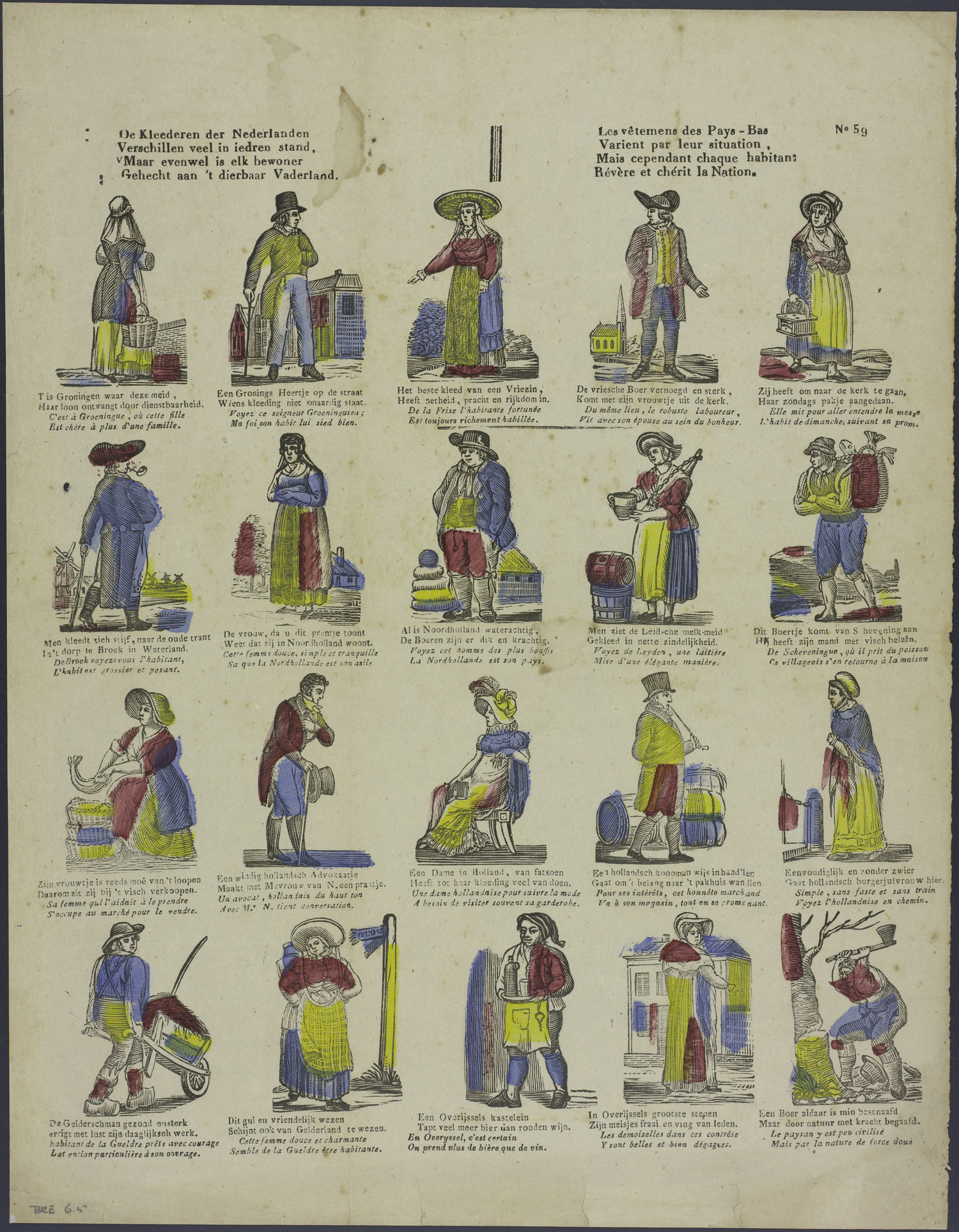 Centsprent met 4 x 5 niet omkaderde houtsneden, met afbeeldingen van personen in de kleding die bij hun stand, beroep en streek past: een meid en een heer uit Groningen; een dame, een boer en boerin uit Friesland; een heer uit Broek in Waterland; een vrouw en een boer uit Noordholland; een melkmeid uit Leiden; een visboer uit Scheveningen; een visvrouw; een 'windige' advocaat, een 'dame van fatsoen', Hollandse koopman en een burgerjuffrouw uit Holland; een boer en boerin van Gelderland; een kastelein, een meisje en een boer uit Overijssel. Bevat tweeregelige rijmende onderschriften in Nederlands en Frans.